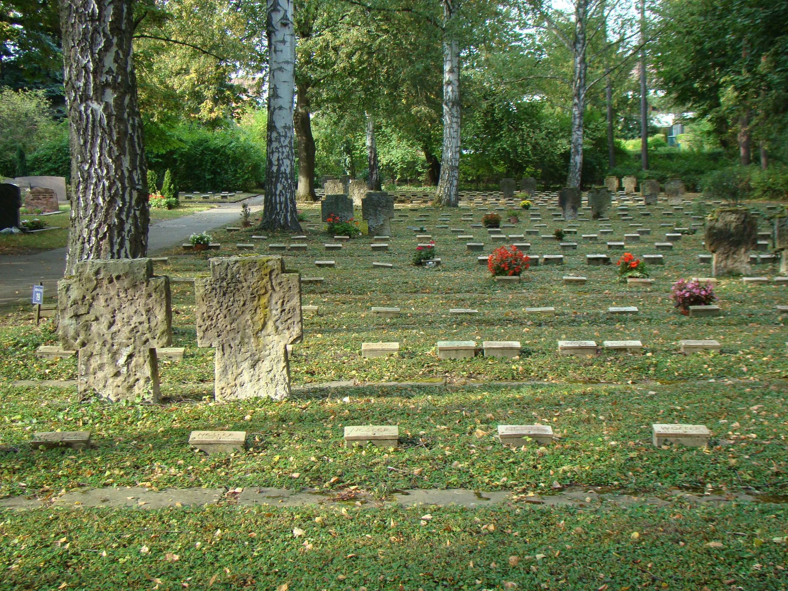 Kriegsgräber auf dem Friedhof in Heilbronn-Böckingen